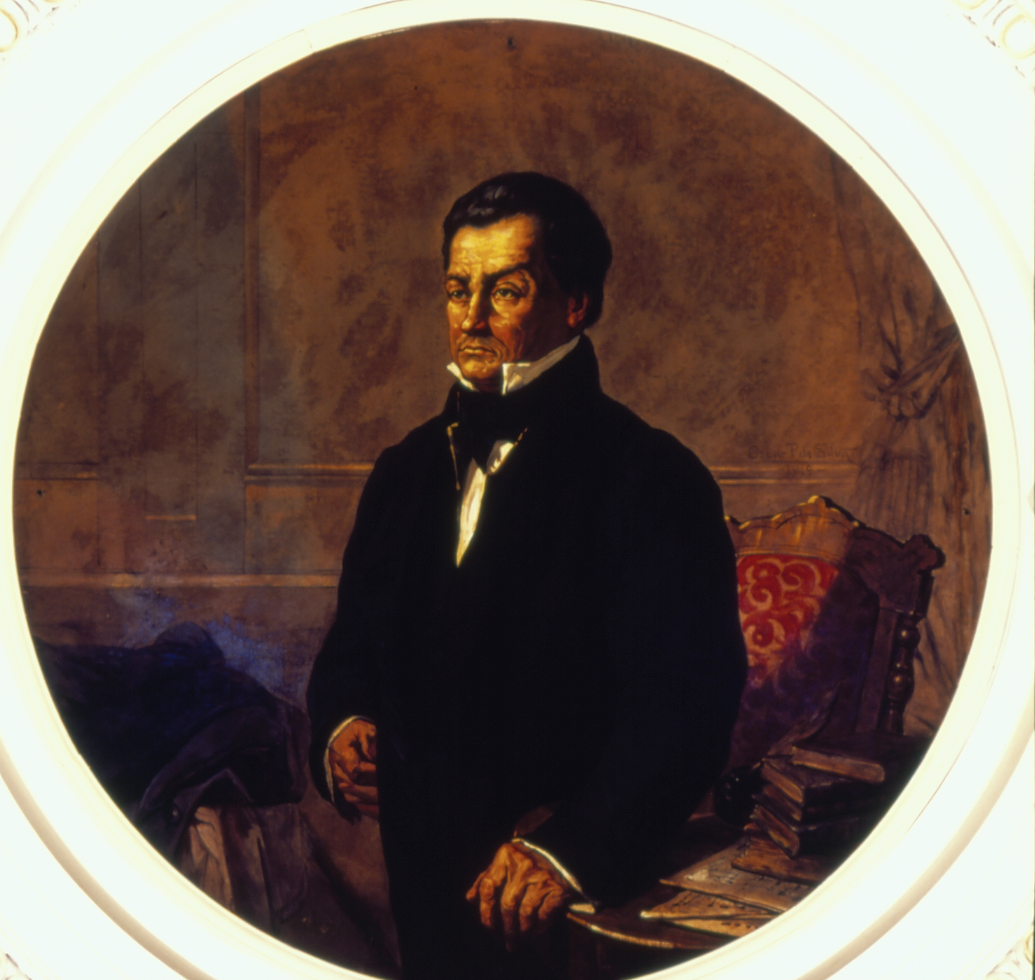 Obra que integra o acervo do Museu Paulista da USP. Coleção Fundo Museu Paulista - FMP